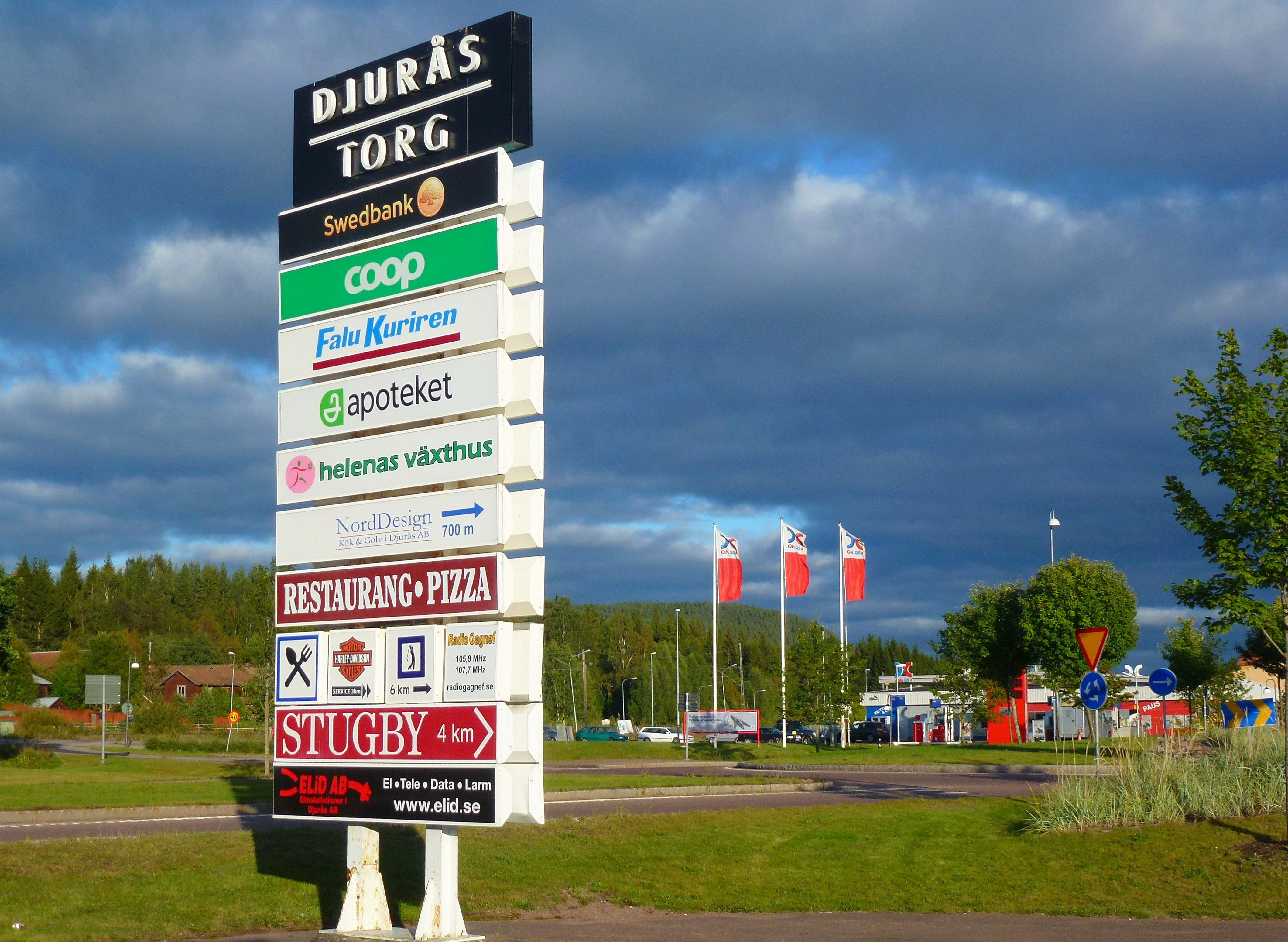 Djurås Torg